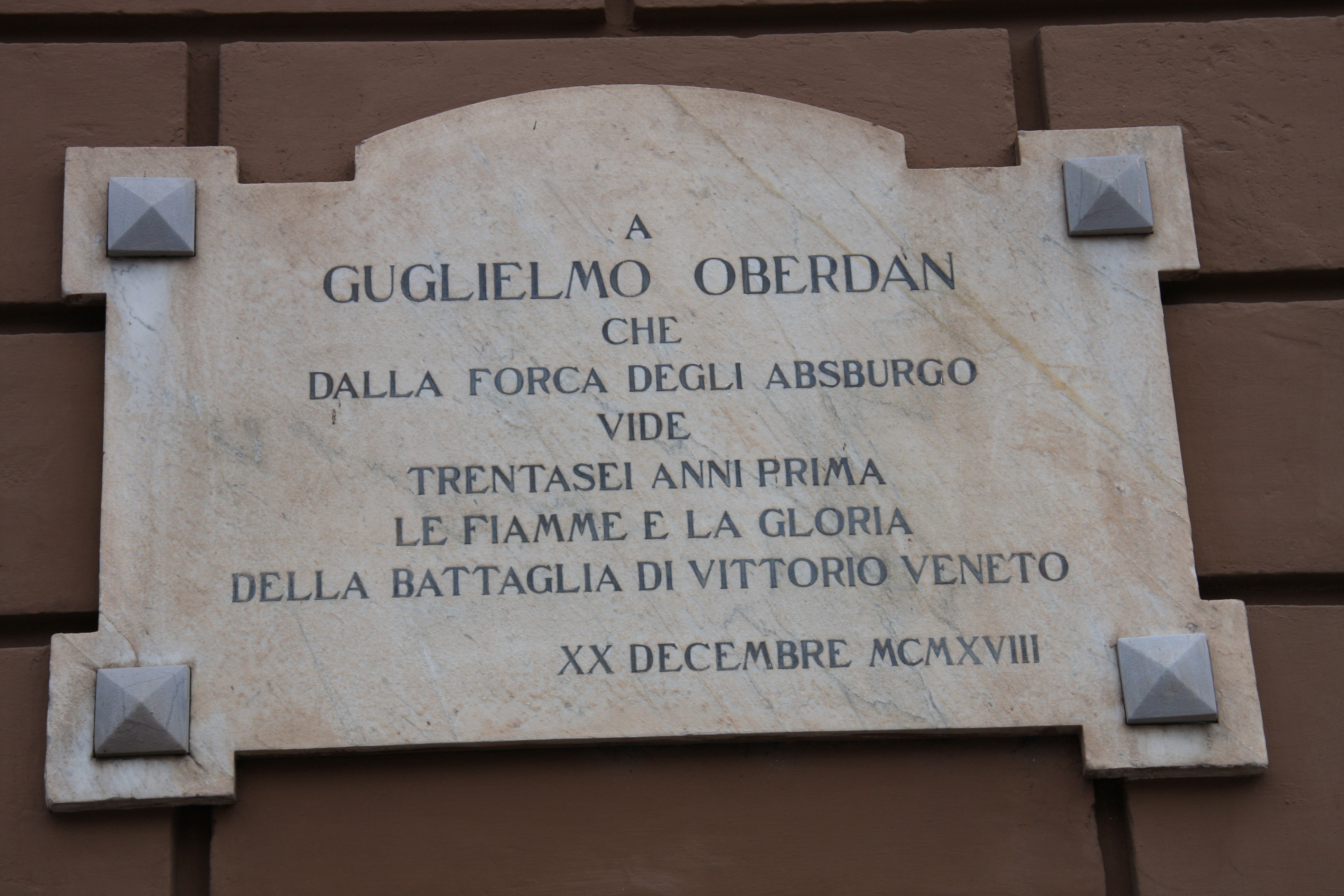 Plaque en la mémoire de Guglielmo Oberdan Théâtre comunal Piccinni - Bari